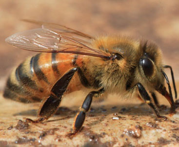 пчела медоносная